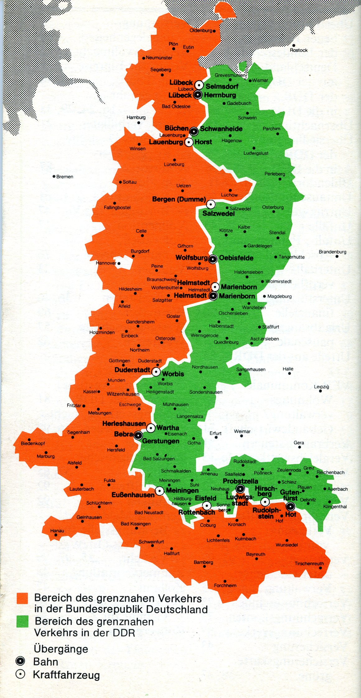 Bereiche des Grenznahen Verkehrs und die Übergänge für Bahn und Kfz, in der Bundesrepublik Deutschland und in der DDR. Aus dem amtlichen Merkblatt "Reisen in die DDR".